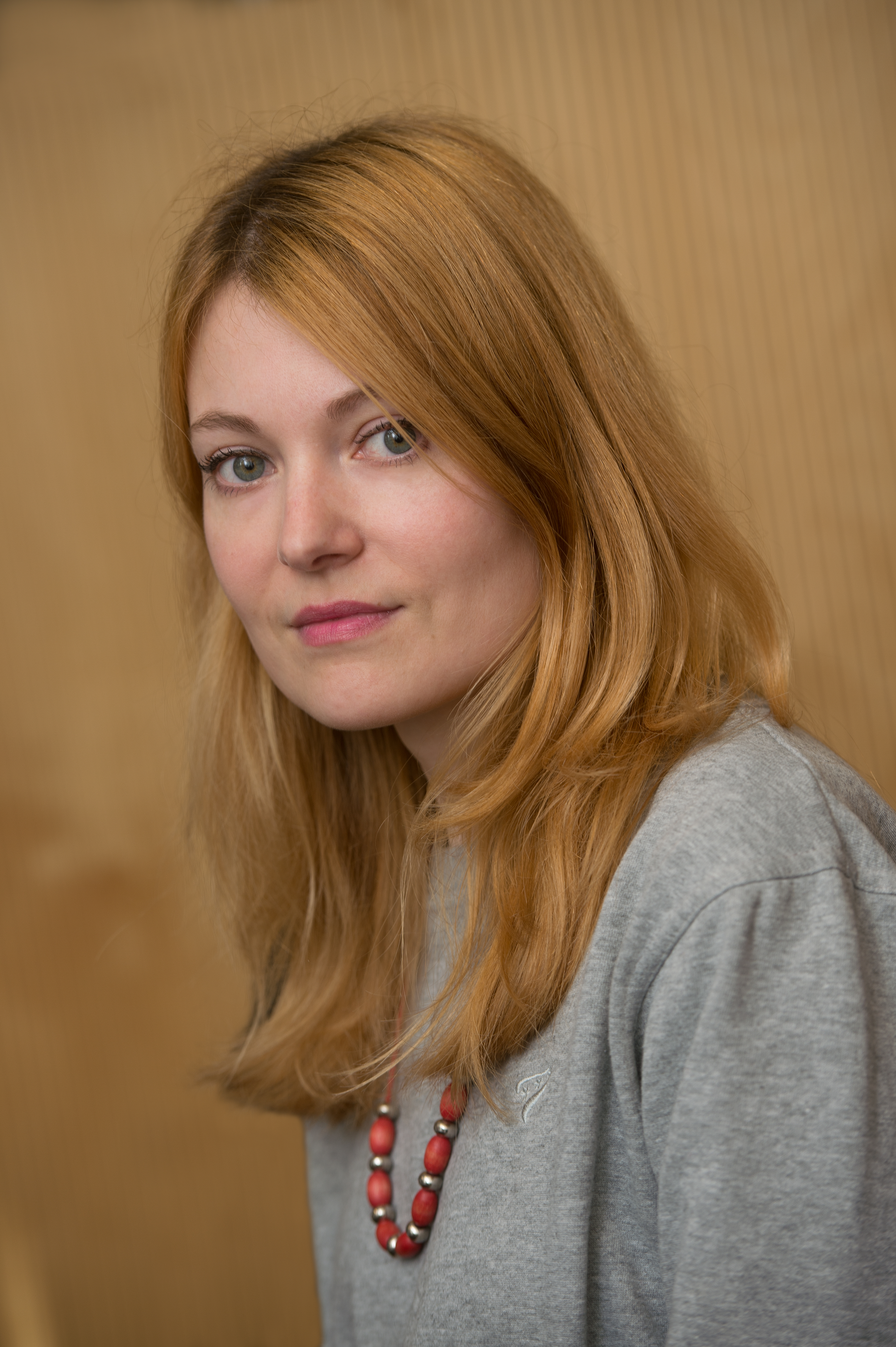 Mari Peegel